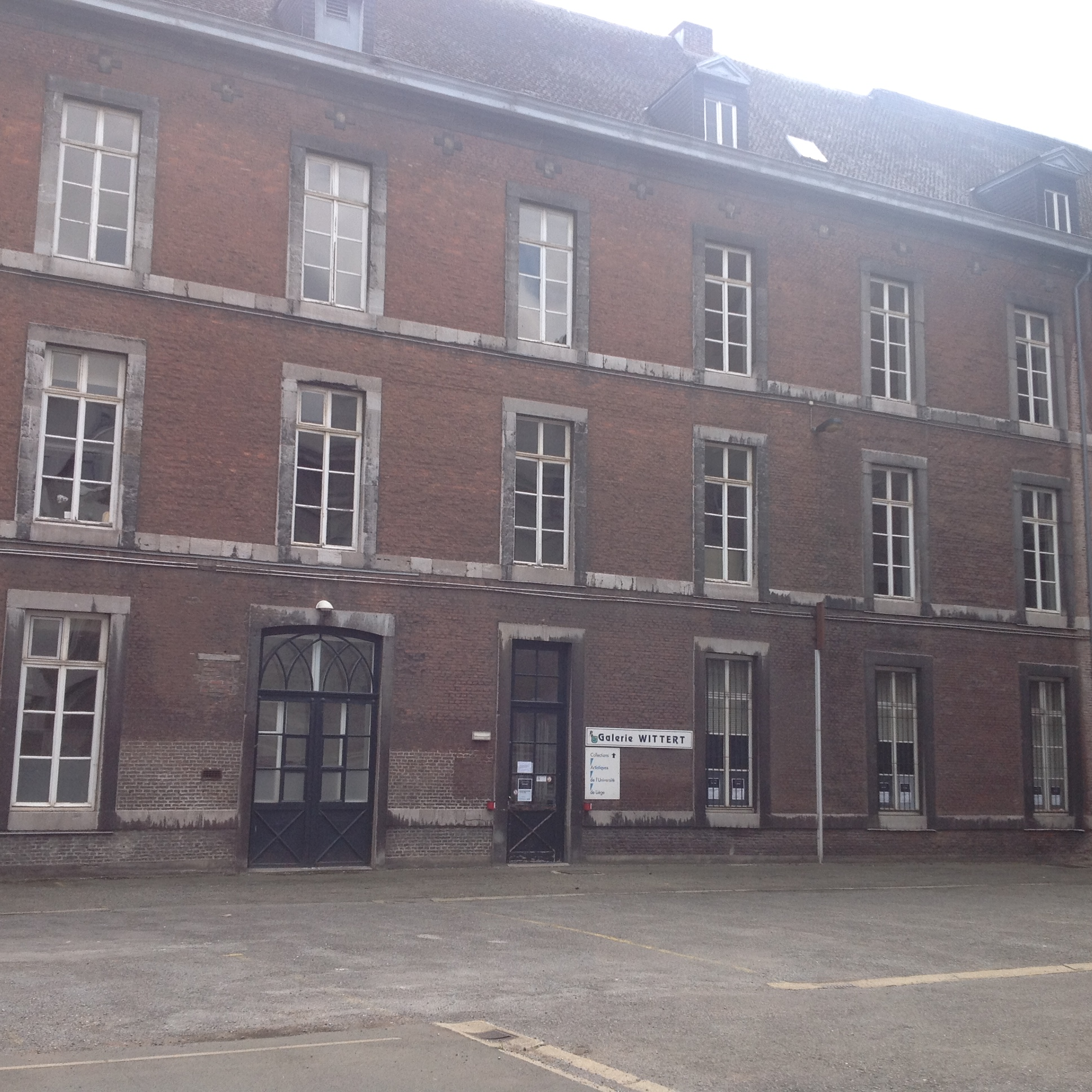 Galerie Wittert, Liège, Belgium